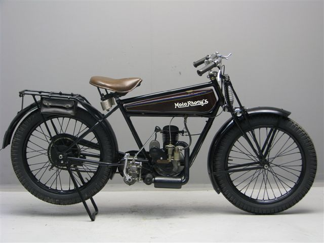 Rhony'x Model C 184 cc motorcycle from 1924